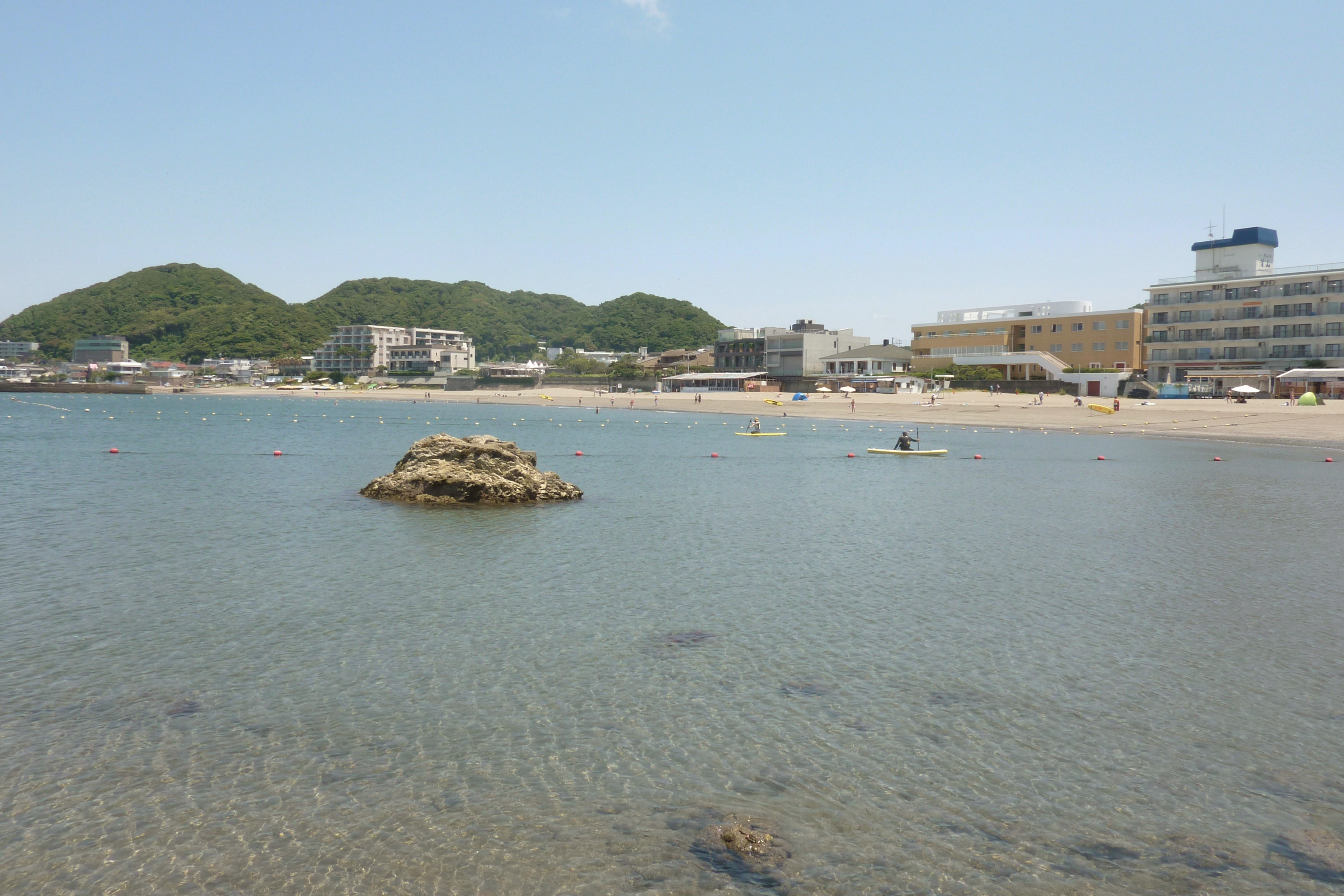 森戸海岸(神奈川県葉山町)